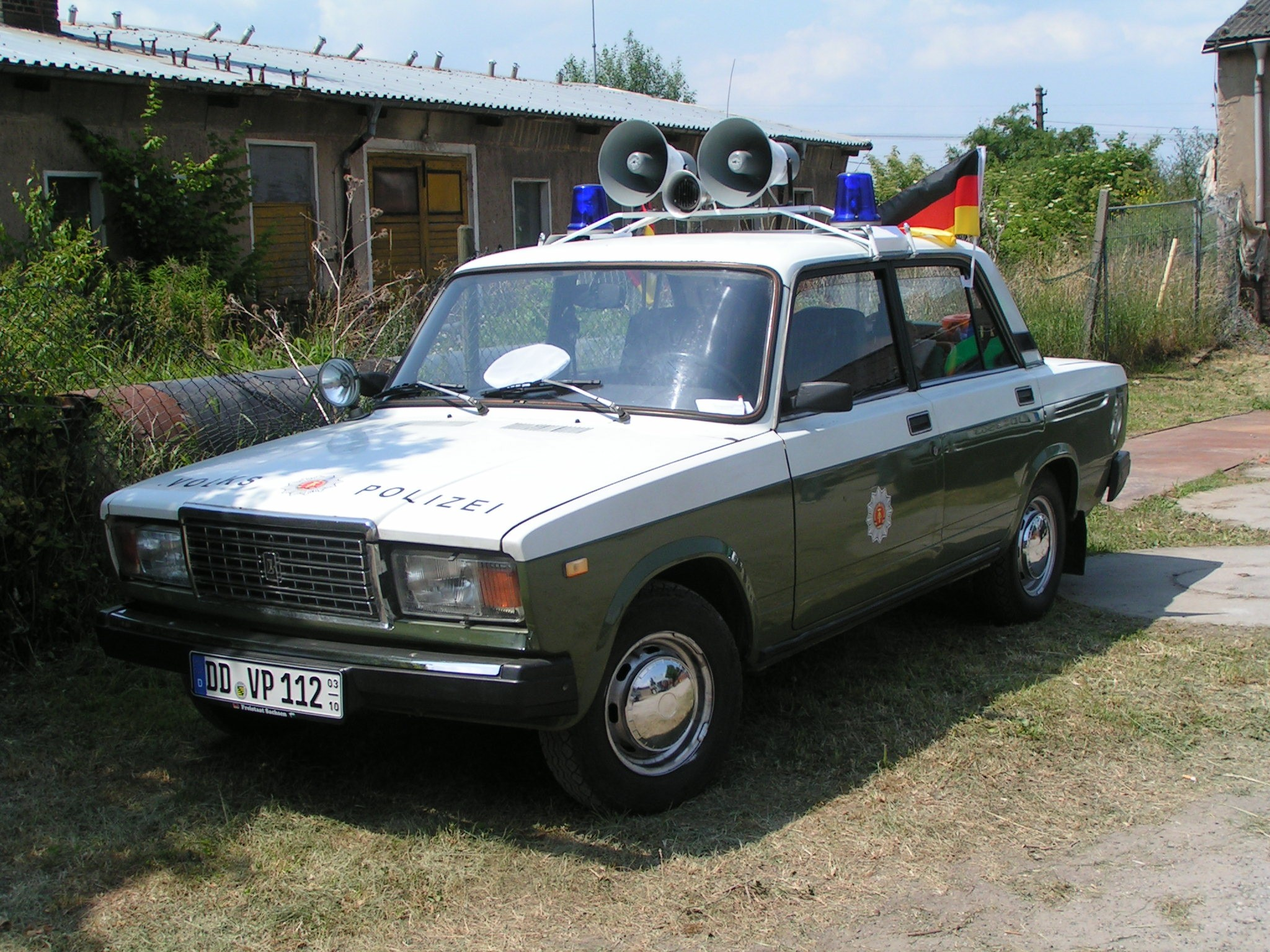 Dresden Roßthal,Schulfest